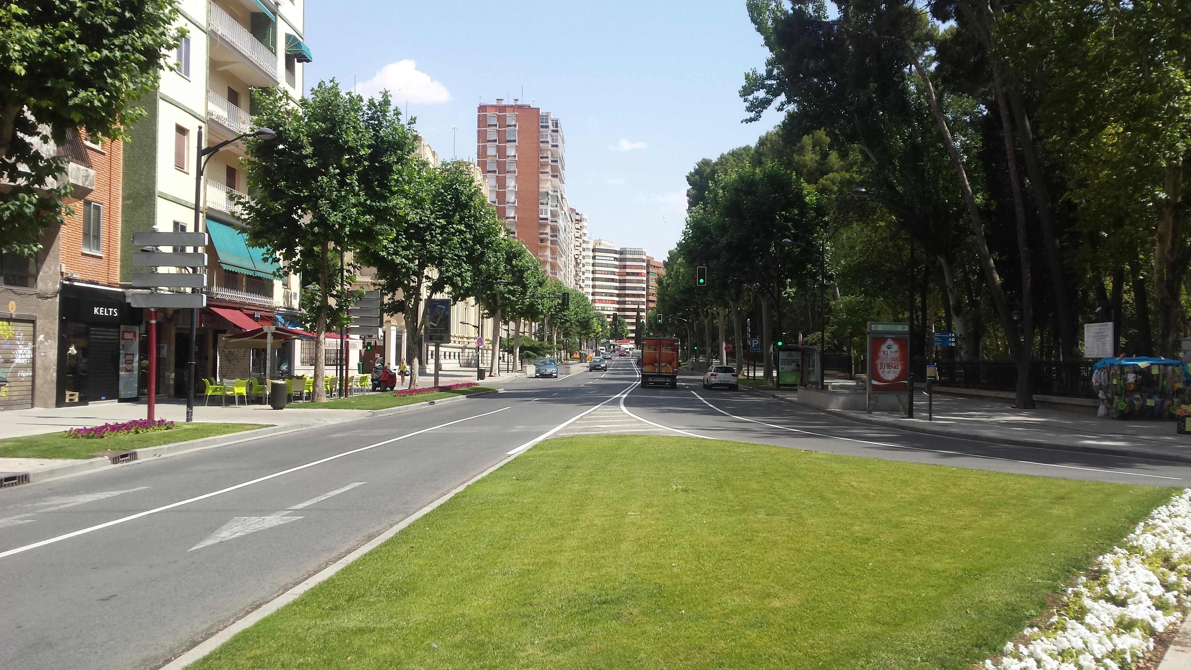 Avenida de España